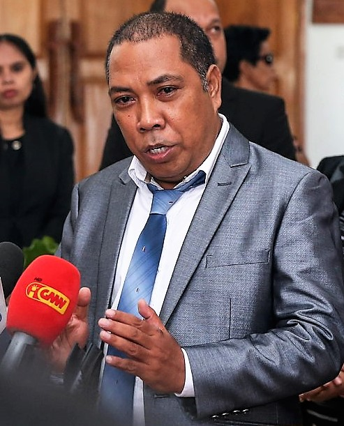 Abrão José Freitas, Interim-PLP-Vorsitzender